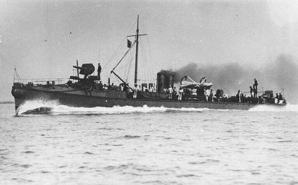 Der erste britische Zerstörer HMS Havock in seiner Ursprungsform